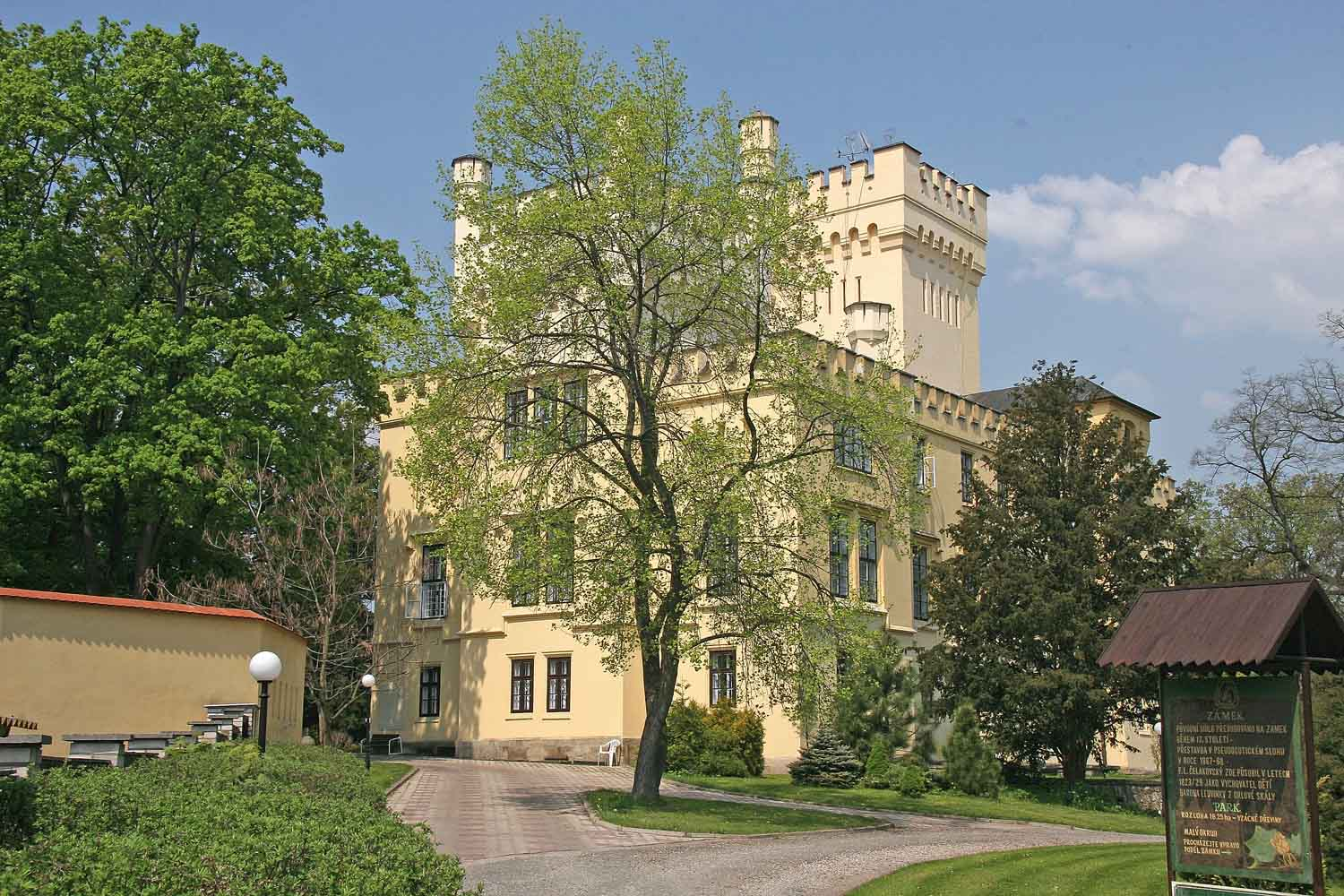 Castle in village Skřivany, district Hradec Králové, Czech Republic Autor: Prazak Date: 20. 5. 2006